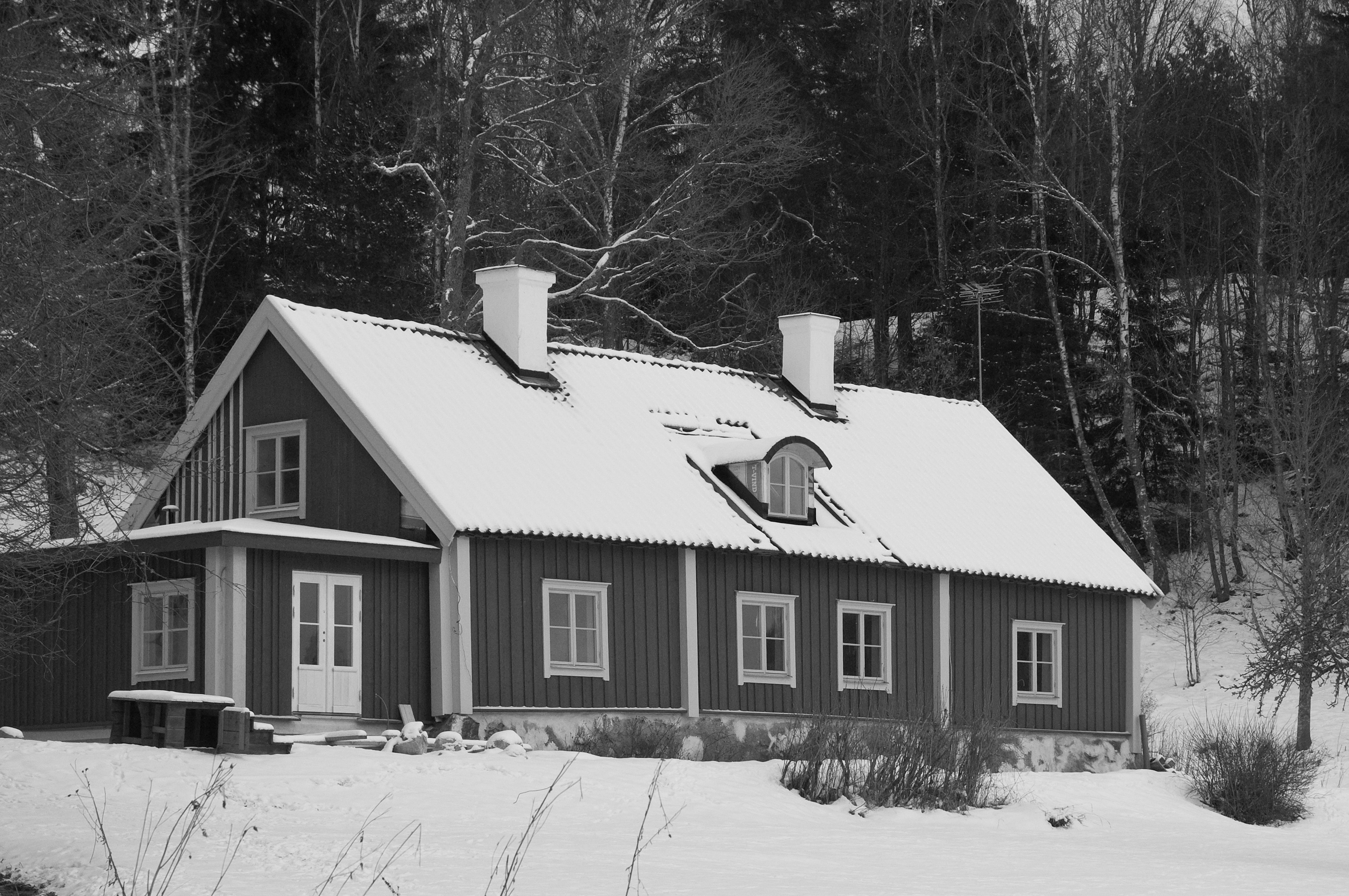 Bogsta prästgård vid sjön Runnviken i Bogsta socken, Nyköpings kommun i Södermanland. Byggd 1697.